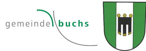 Das Logo der Gemeinde Buchs SG bis Ende 2014